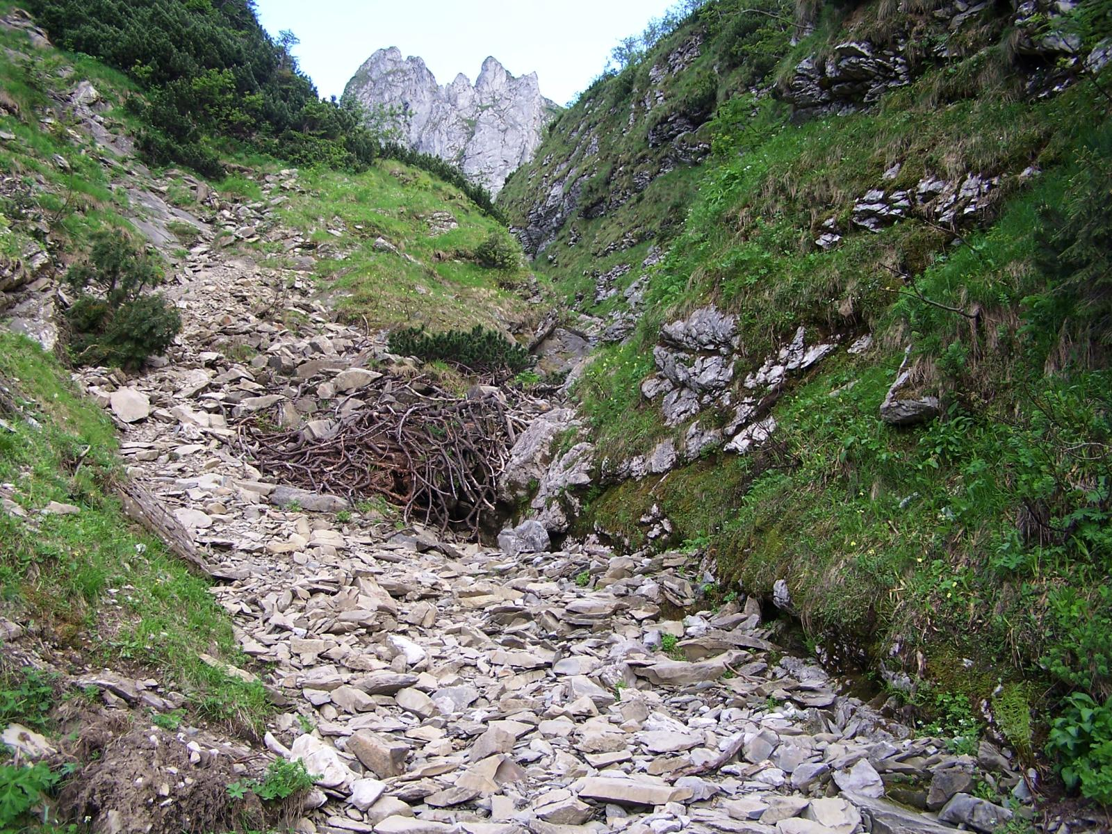 Dolina Małej Łąki (Tatra Mountains)